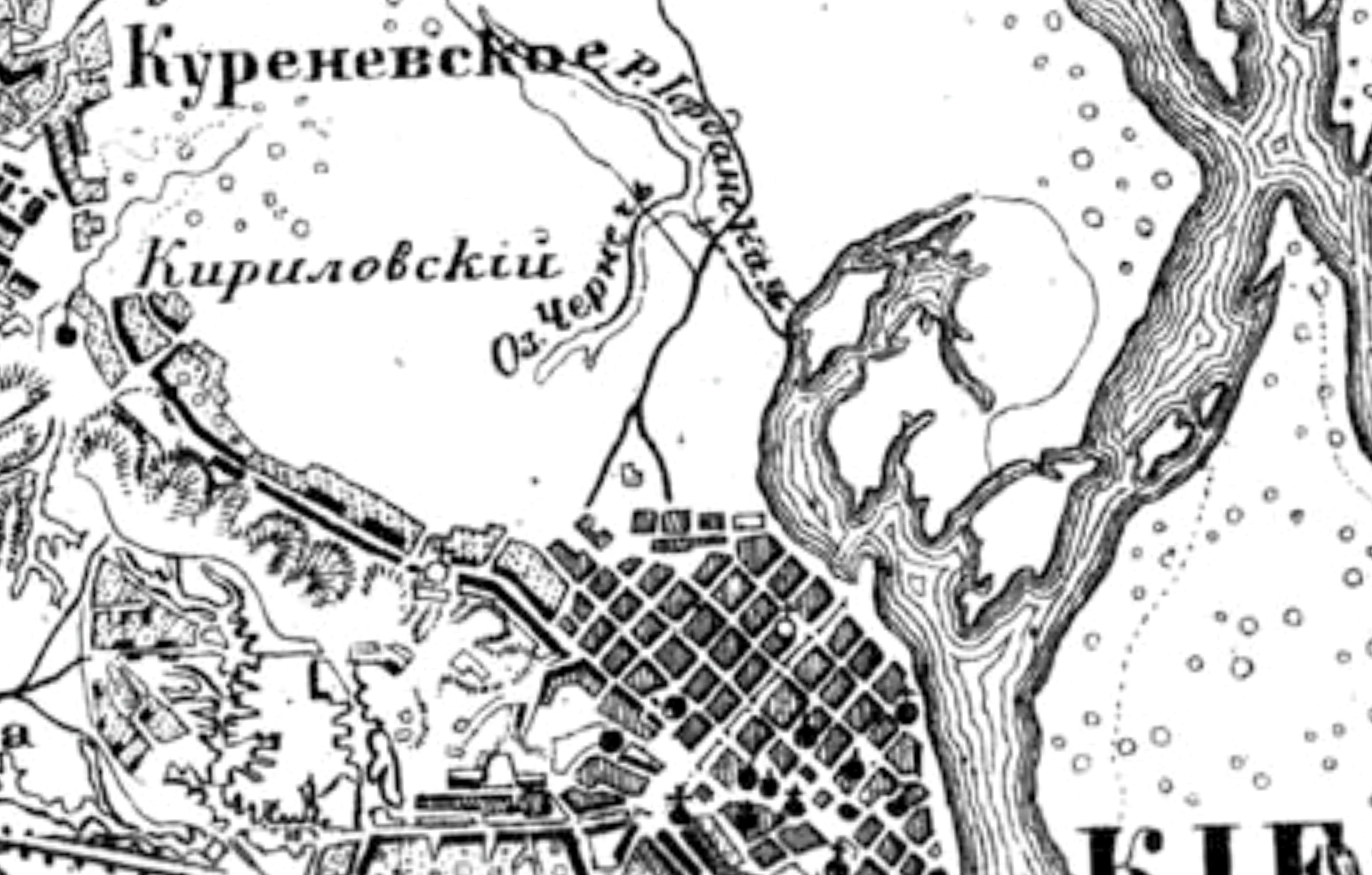 Фрагмент карты, прилагающейся к книге Гошкевича В. Замок князя Симеона Олельковича и летописный Городец под Киевом (1890). Отмечена река Почайна - река Иорданская, а также озеро Пичаня (Долгое, Кирилловское - Иорданское)